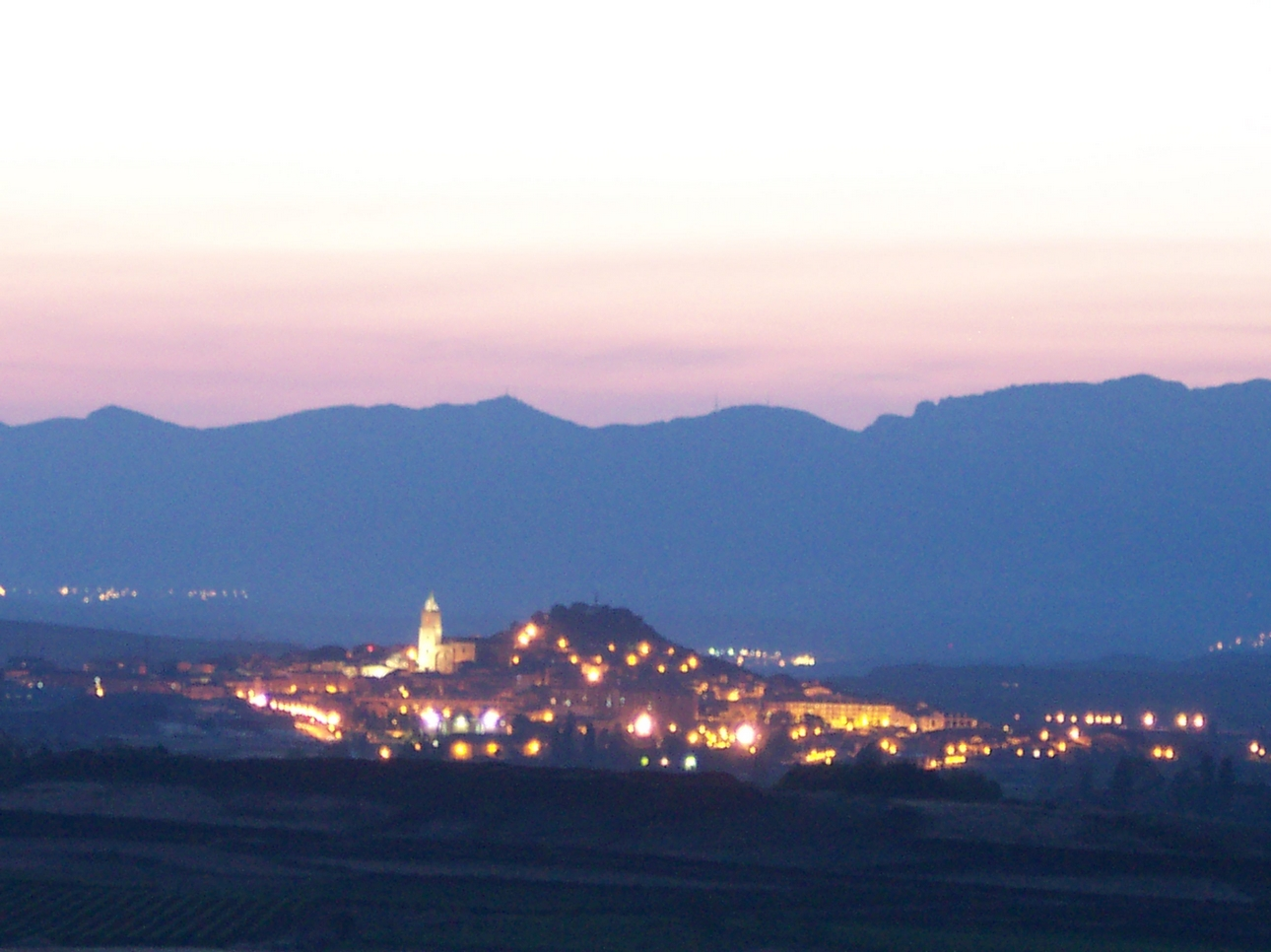 Foto de Navarrete al anochecer, hecha desde Entrena